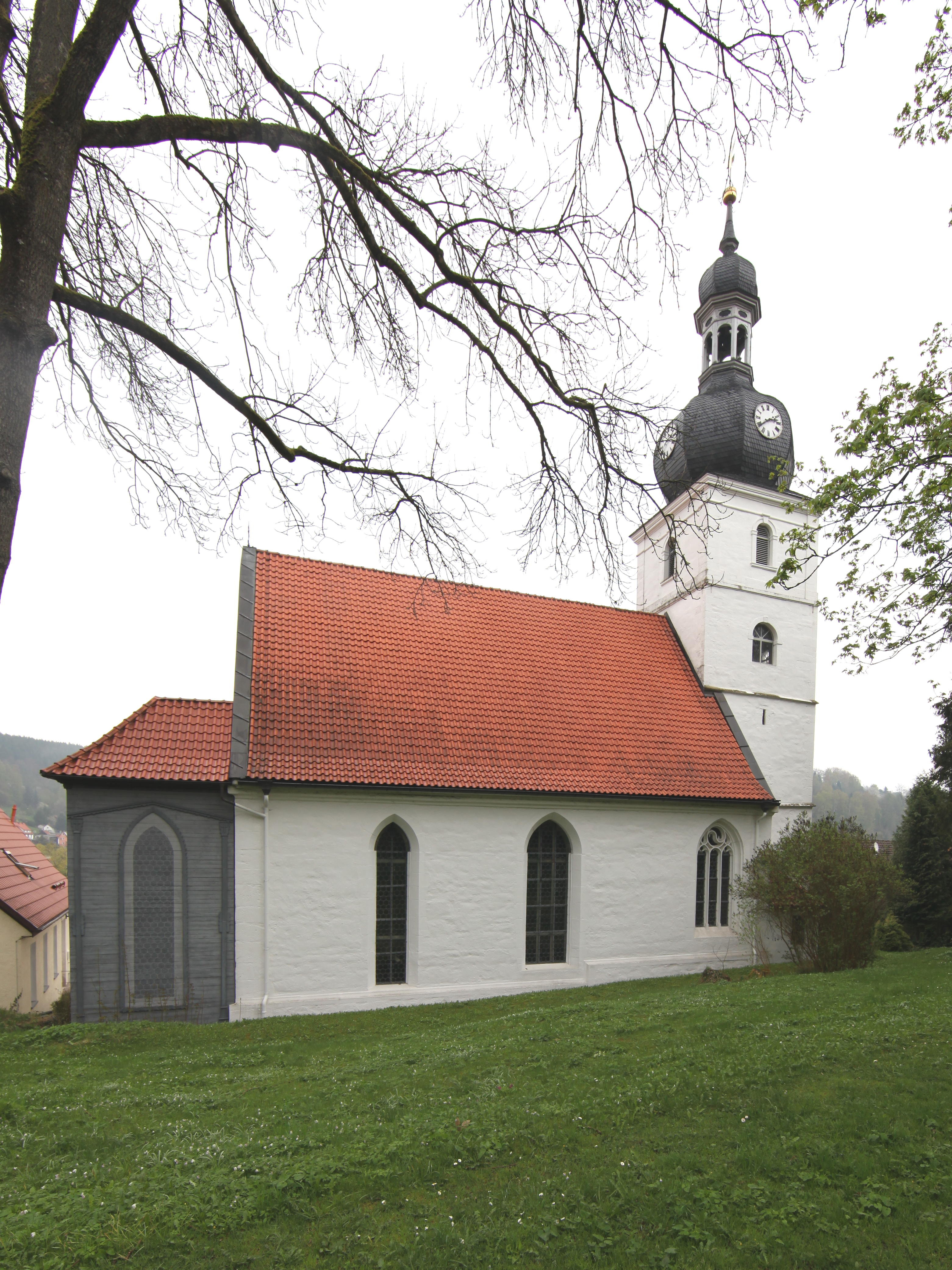 evangelisch-lutherische Kirche St. Ulrich, 1116 erstmals urkundlich erwähnt, Baubeginn 1452, 1503 geweiht. Reiche Ausstattung, Sakramentshaus, Chormalerei. Heinrichs, OT von Suhl